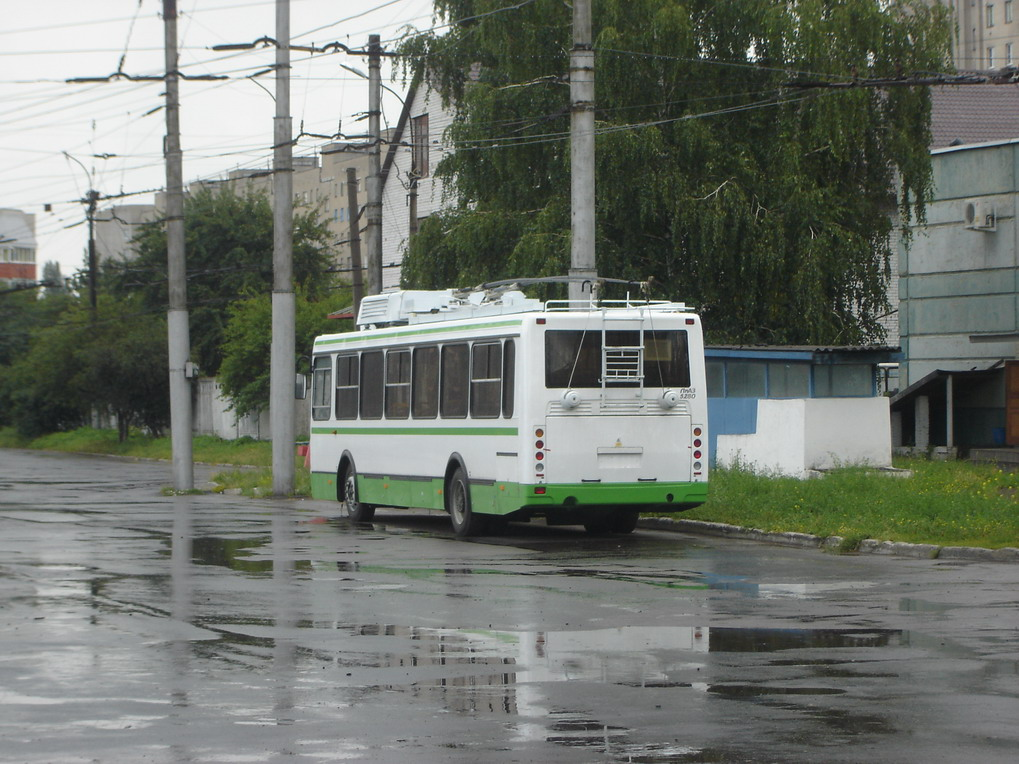 Троллейбус ЛиАЗ-5280 в Воронеже